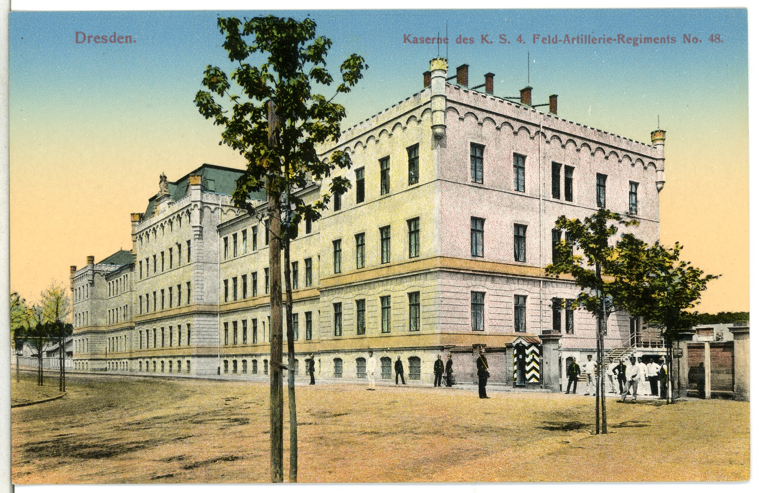 Dresden; Kaserne des 4. Königlich Sächsischen Feld-Artillerie-Regiments Nr. 48 This postcard is from publisher Brück & Sohn in Meißen ( postcard has a unique number 12987 and is available in a higher resolution at the publisher. This images was uploaded in a cooperation project between Wikipedians and the publisher.